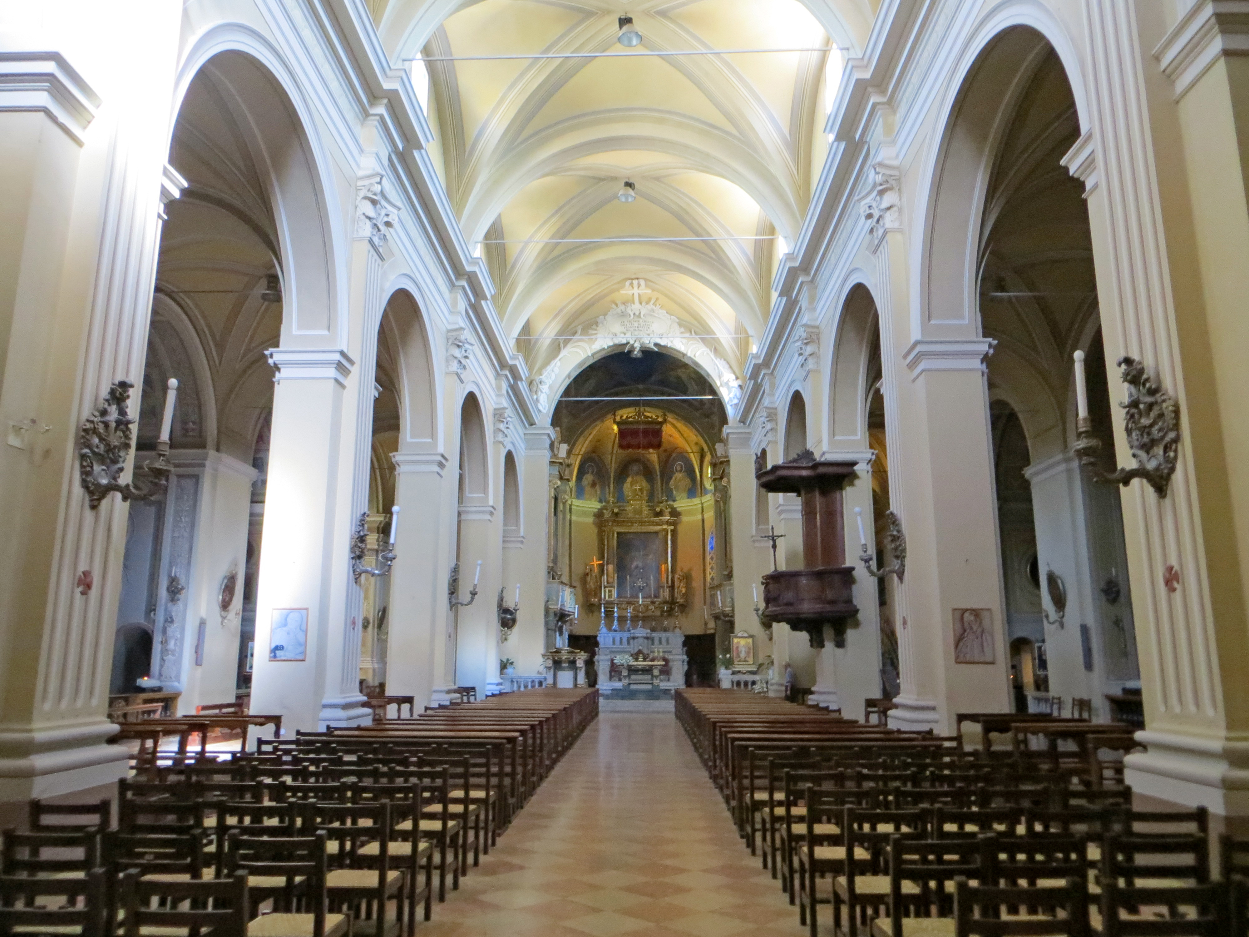 Duomo di Santa Margherita (Colorno) - navata centrale